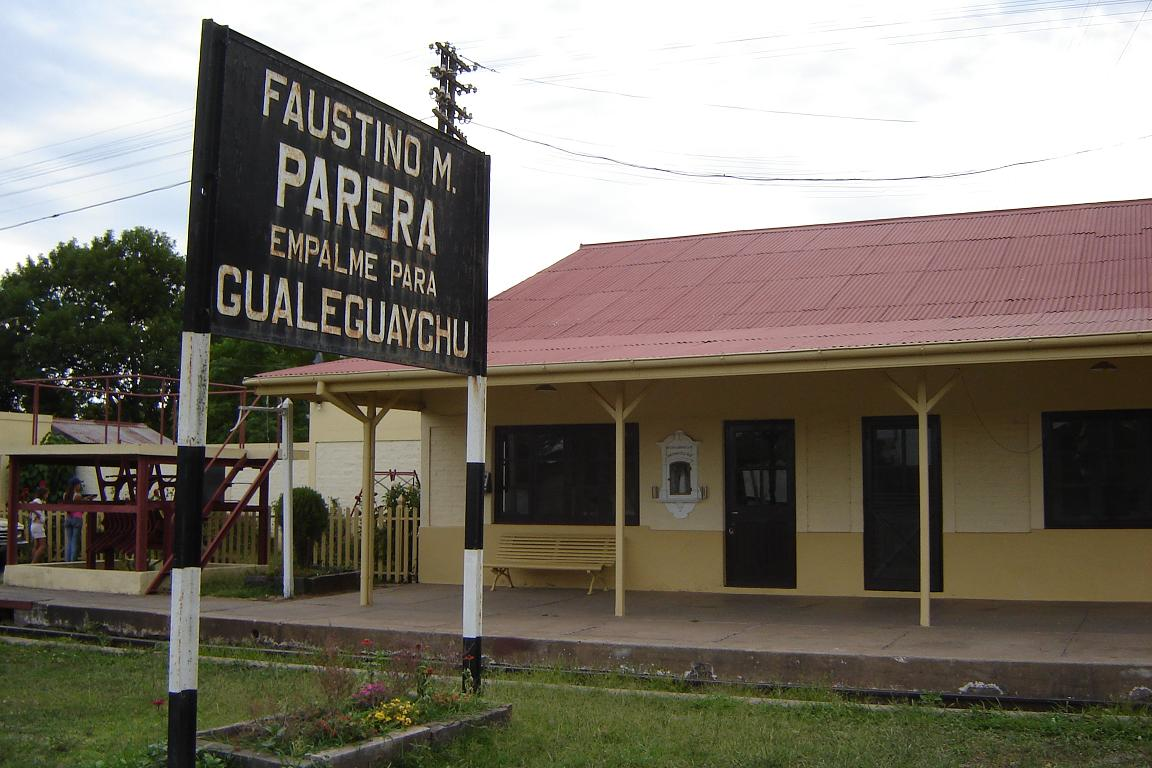 Estación de tren de Parera, Entre Ríos, Argentina.